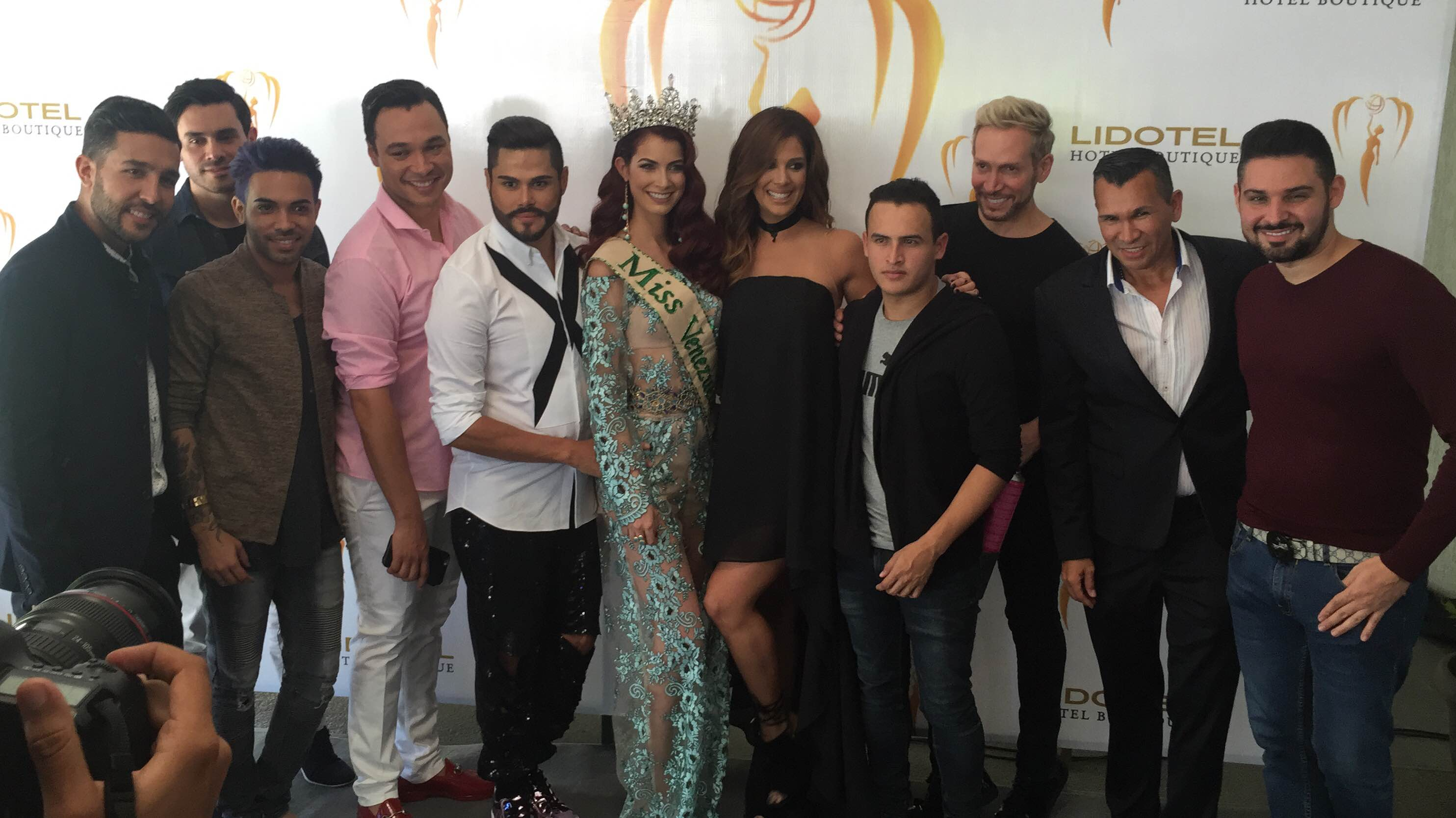 Miss Earth Venezuela Organization press conference